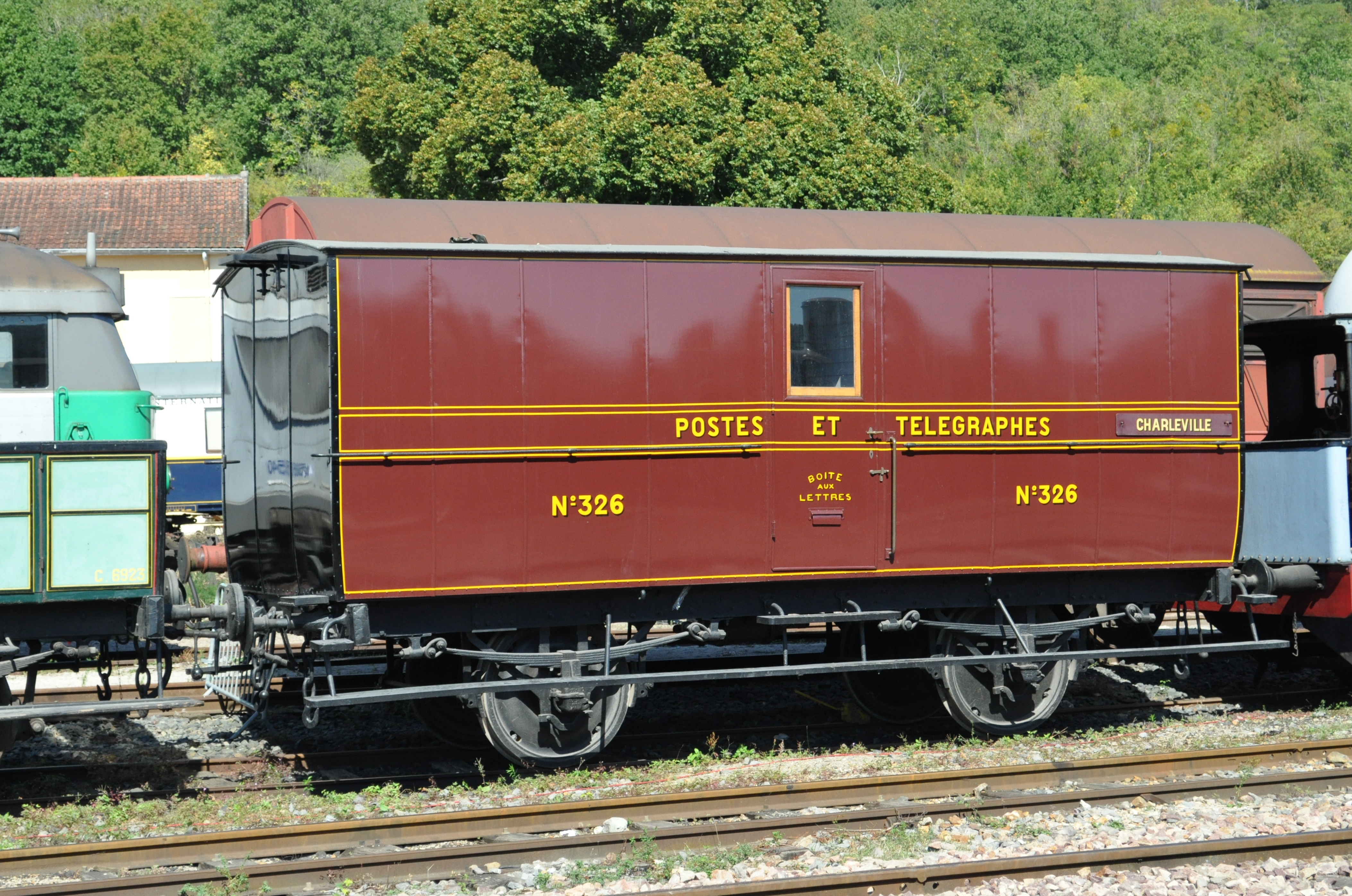 La voiture postale PE 326 Ouest à Longueville le 16 septembre 2012.